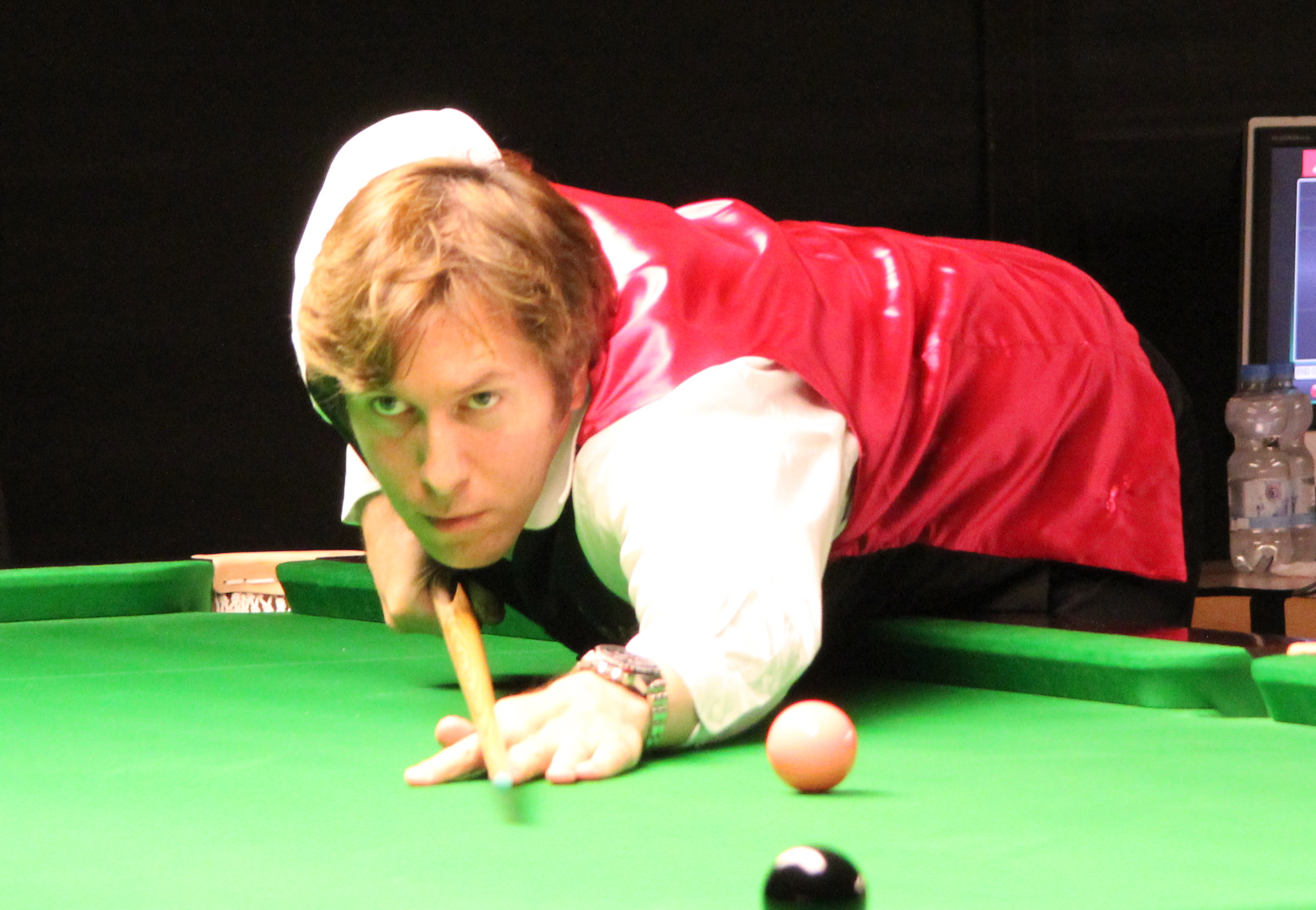 Dominic Dale beim Paul Hunter Classic 2011